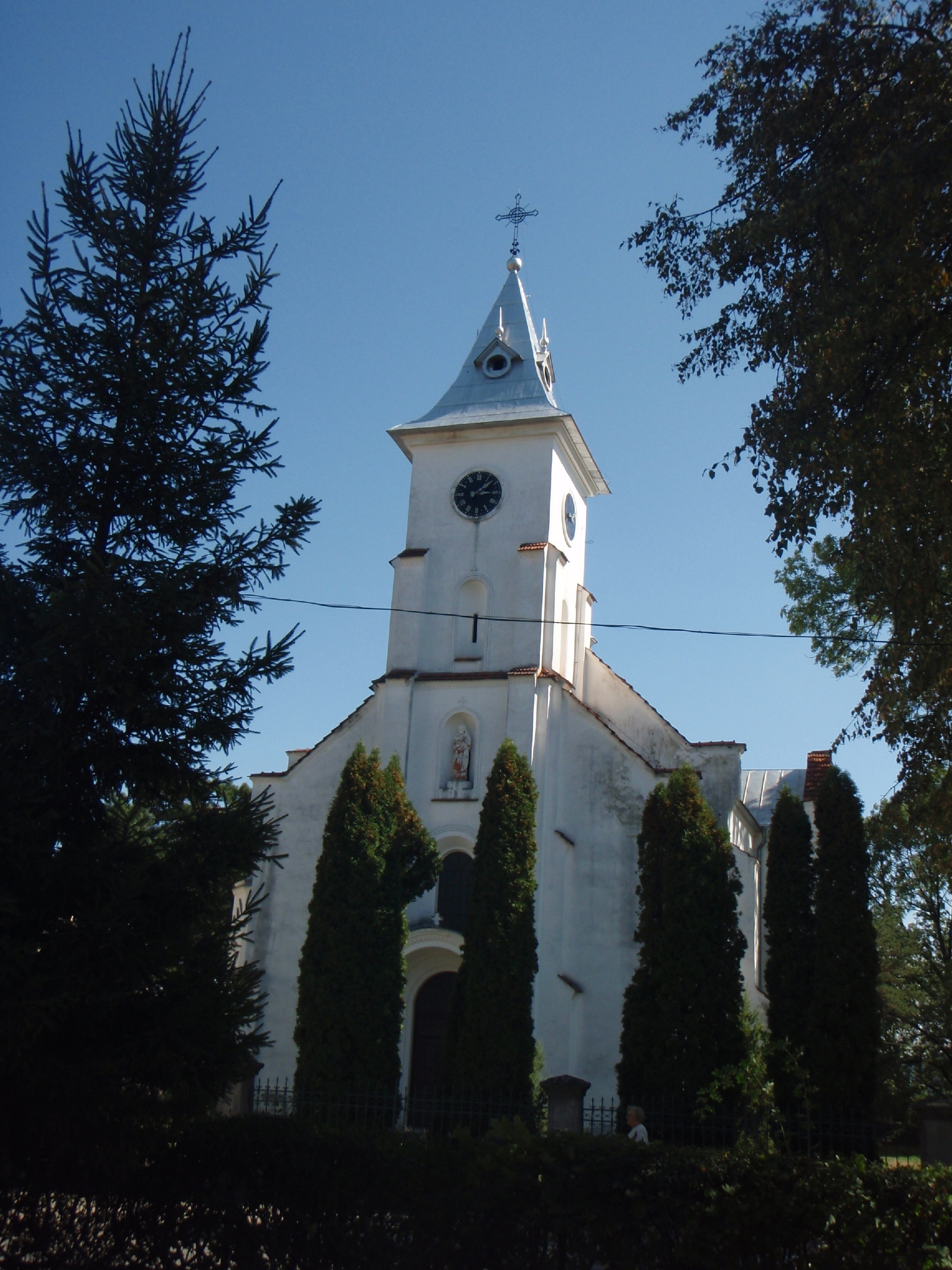 Кути, костел